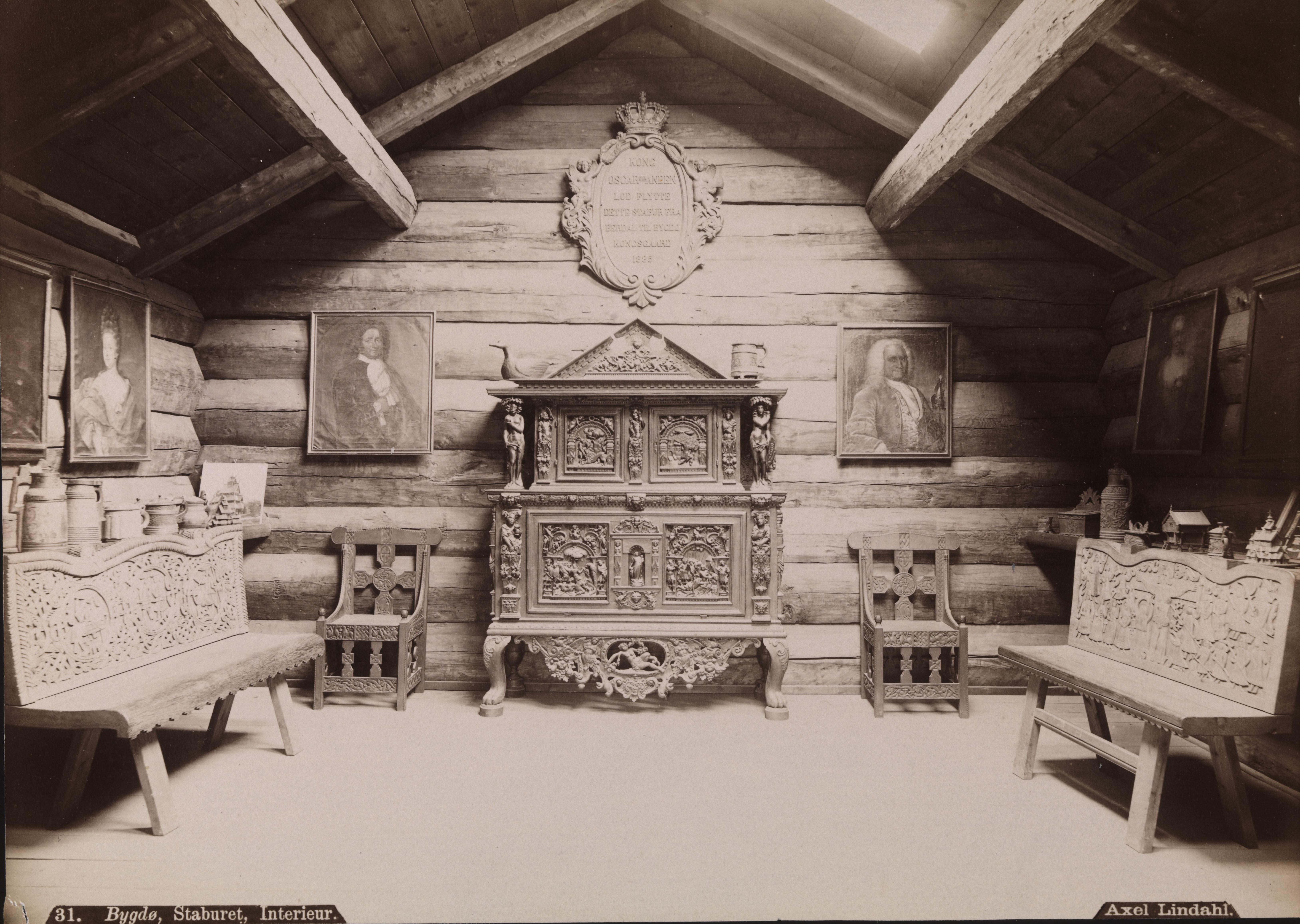 Sted: Kommune: Fylke: Tagger: benker interiør malerier møbler skap stoler treskjæring utskjæringer arkitekturfotografi